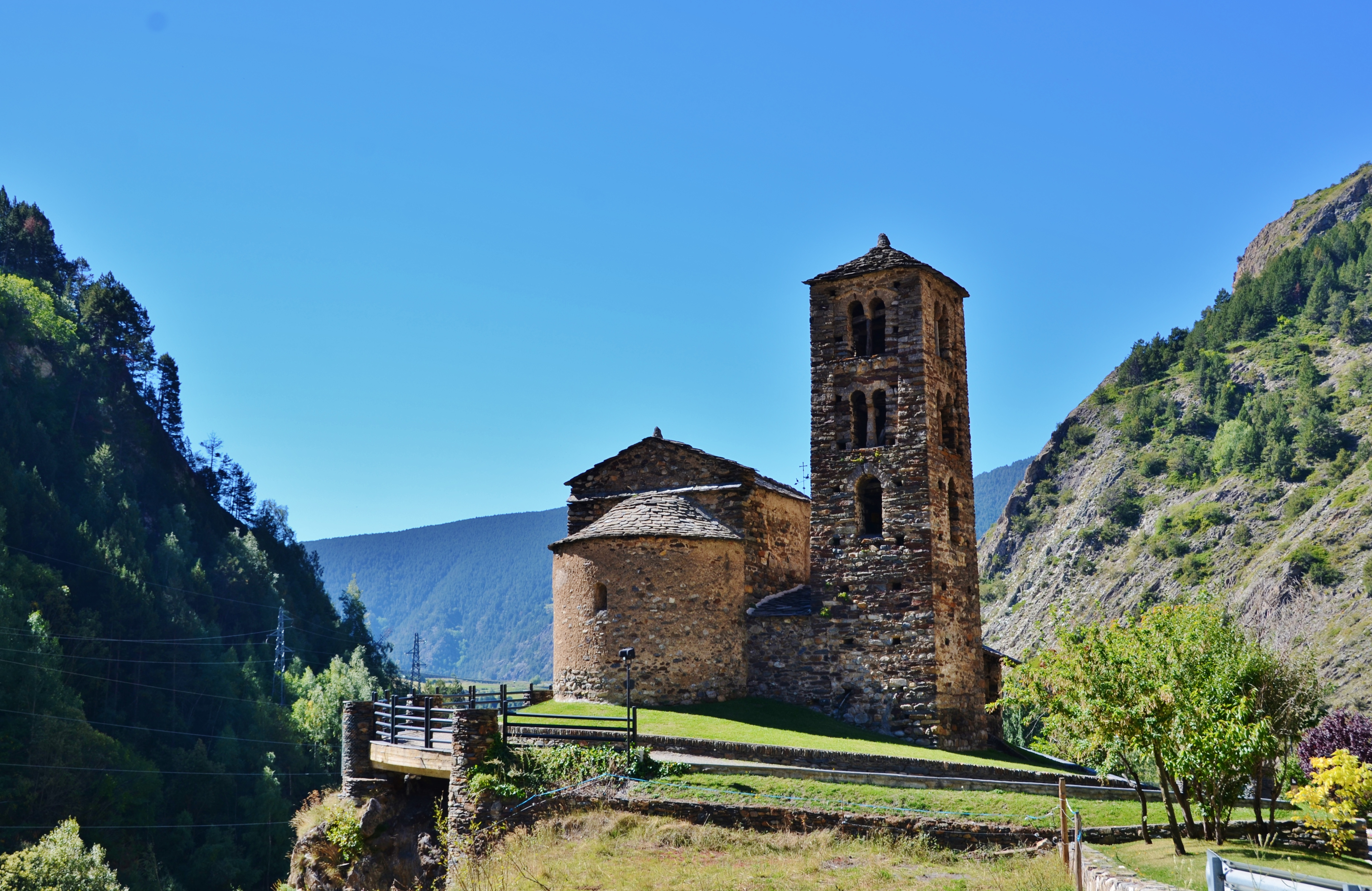 Església de Sant Joan de Caselles